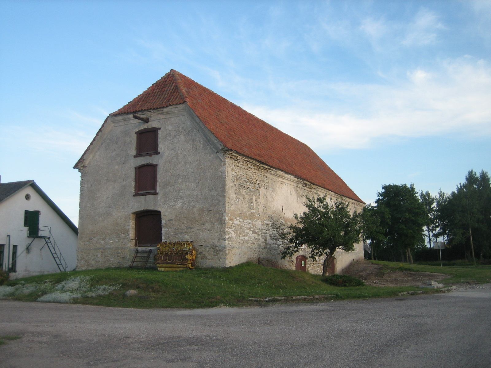 23648 Suursadama ait